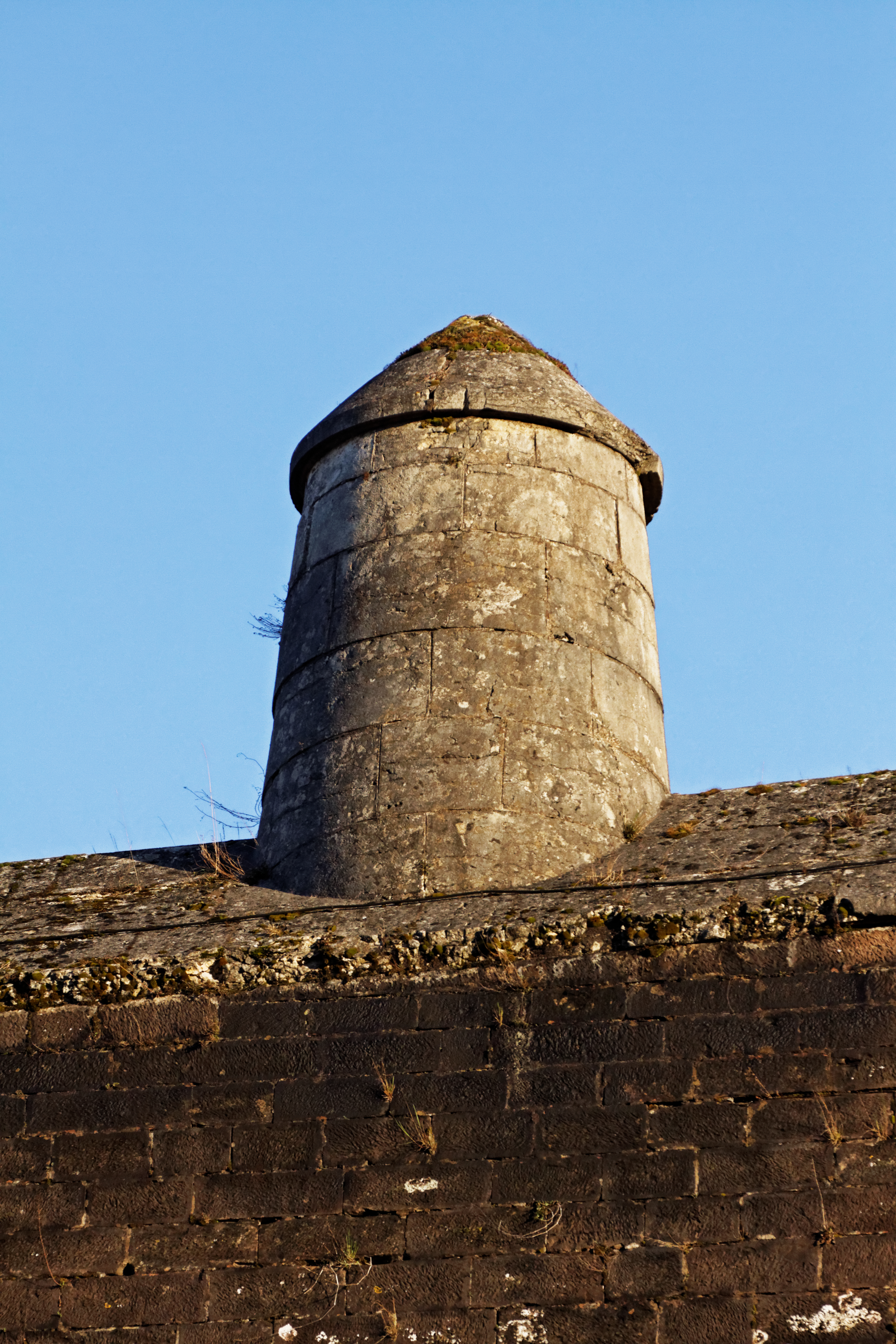 Les fortifications de la citadelle de Belfort. La demoiselle était une construction qui empéchait la progression de l'ennemi sur le faîte de la fortification.